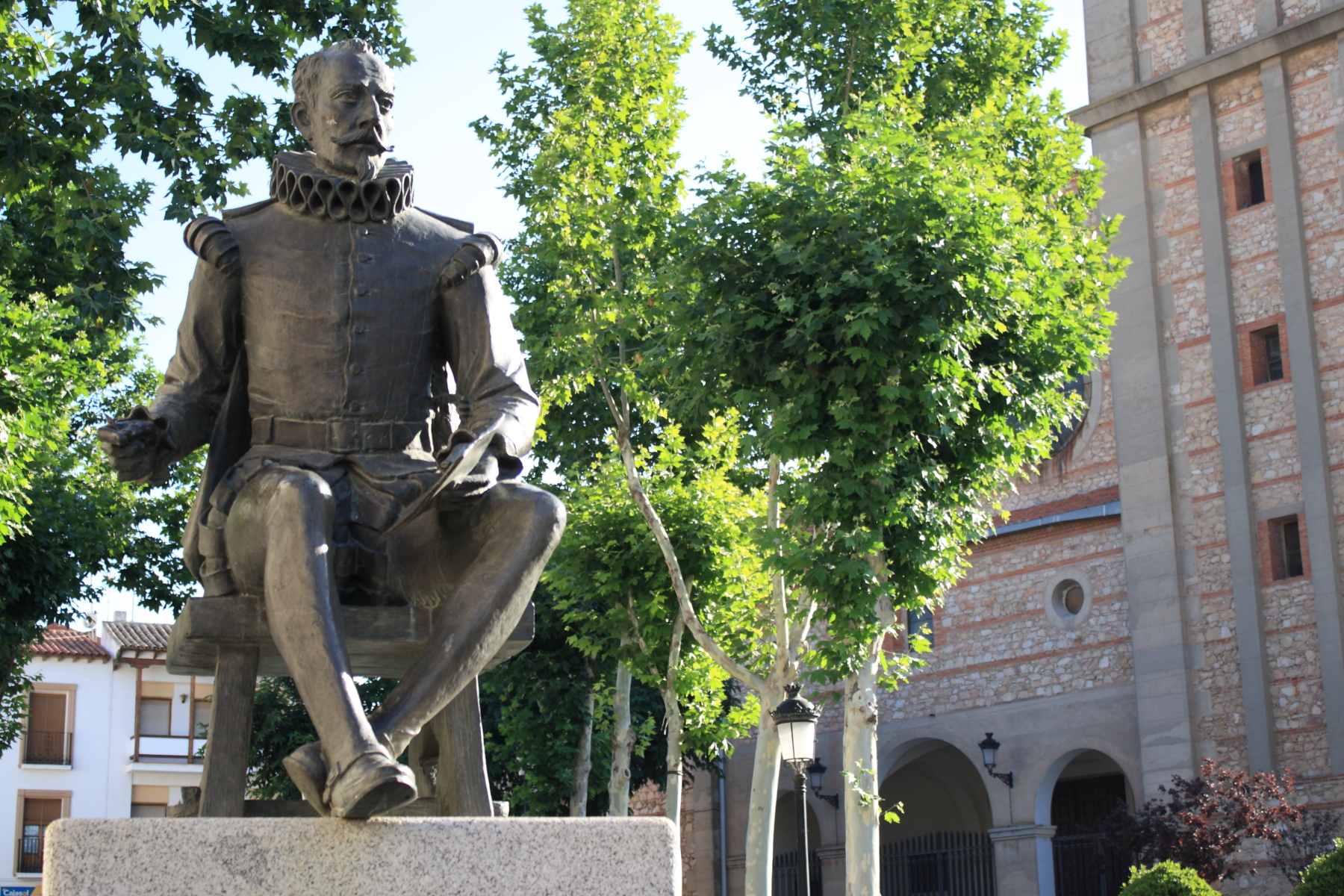 Miguel de Cervantes Campo de Criptana Provincia de Ciudad Real Castilla la Mancha España